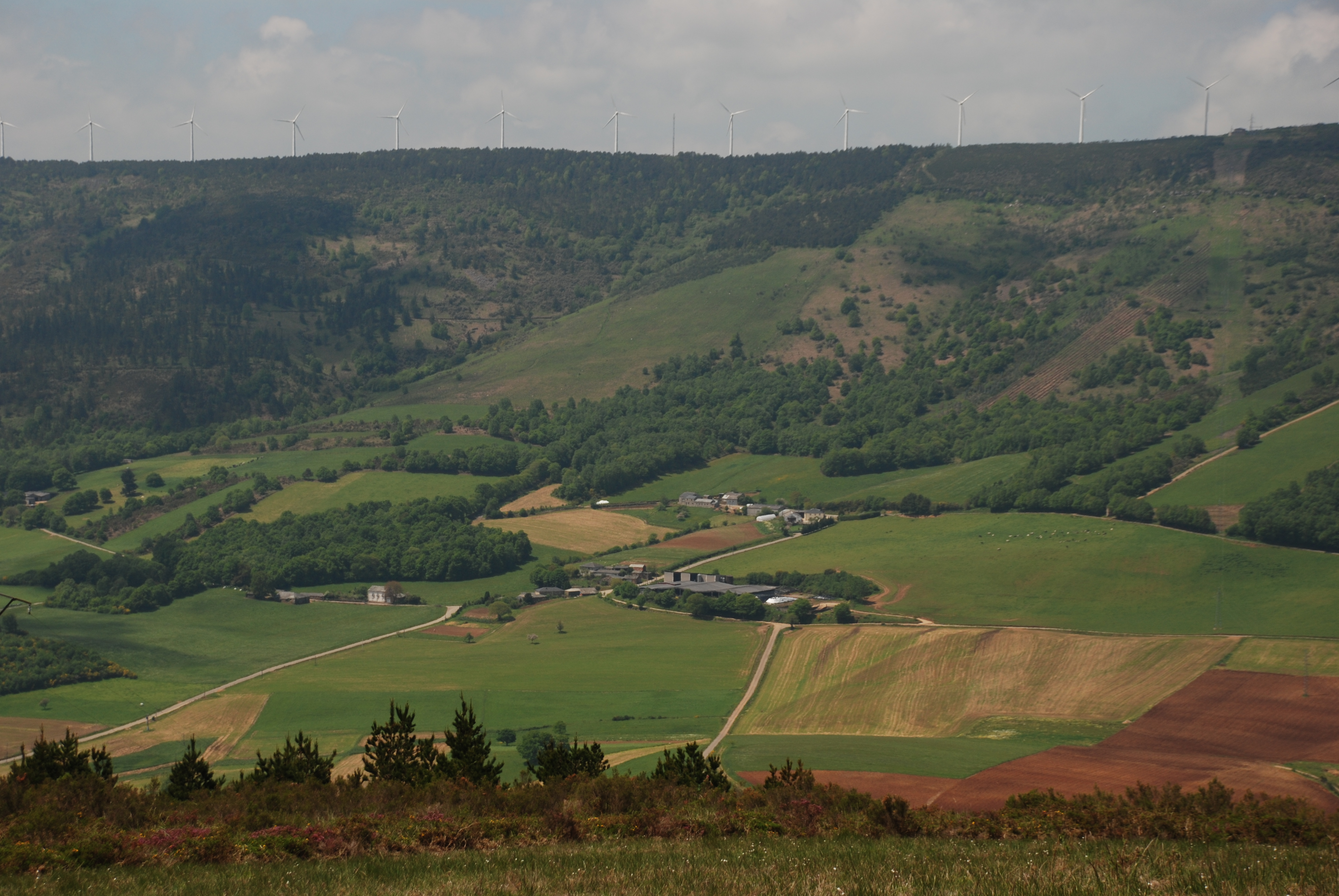 Serra do Miradoiro dende a Cruz da Nena (929 m) no Lugar de Importancia Comunitaria A Marronda. No centro da imaxe pode verse o lugar de Abrairas, na parroquia de Fonteo (Baleira). A serra do Miradoiro está coroada pola Pena Corista (1001 m) á esquerda e o Pradairo (1029 m) á dereita, marcado este último pola caseta forestal. O parque eólico de Punago está instalado ó longo de toda a serra do Miradoiro. A serra do Miradoiro e o monte da Marronda delimitan un longo e plano val polo que discorren as cabeceiras do río Eo: o río Candal e o rego de Mosqueiros. This is a photography of a Special Area of Conservation in Spain with the ID: ES1120004. Natura2000 entry, EEA entry